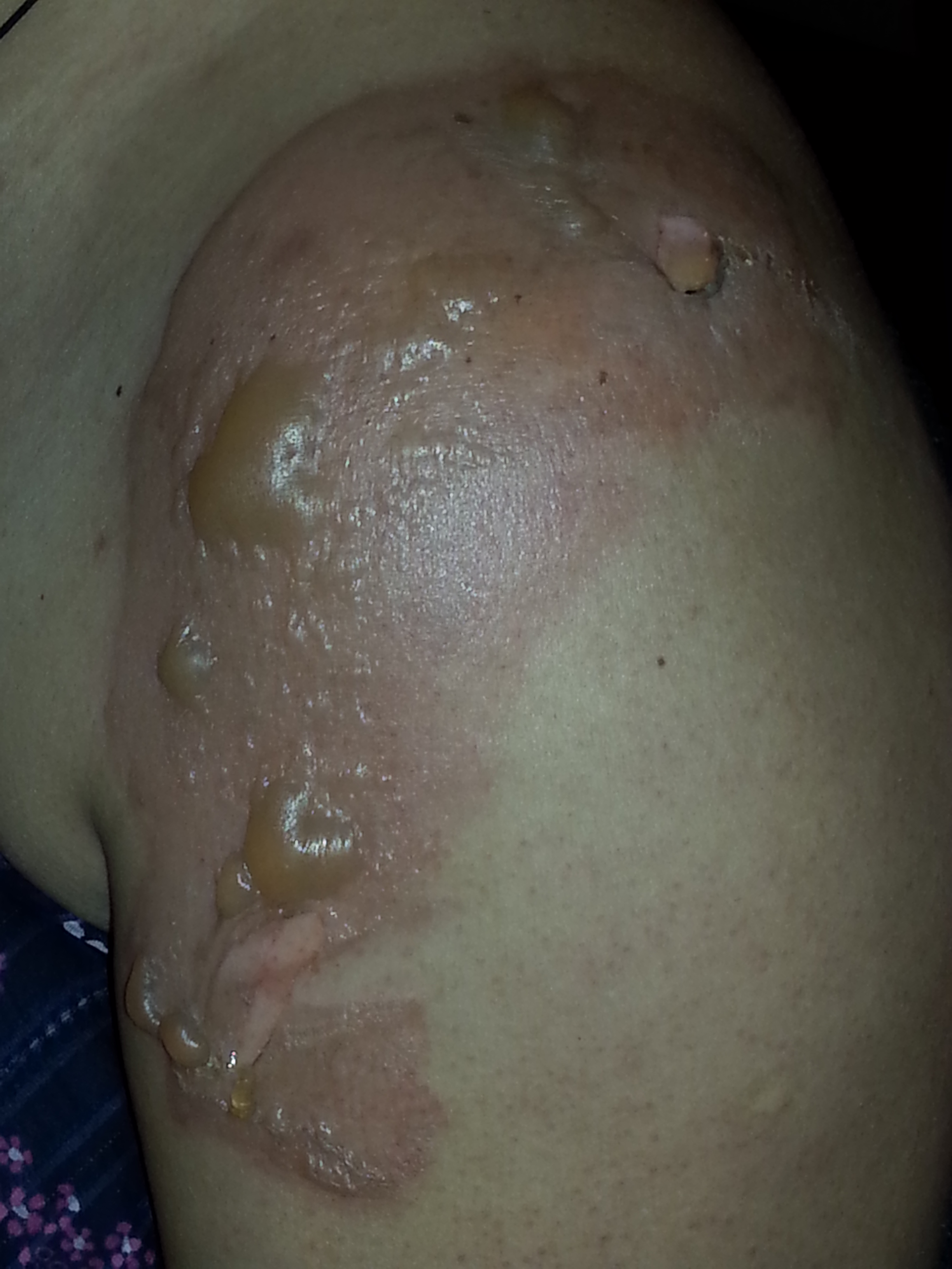 Մասամբ թափանցող այրվածքի ժամանակ առաջանում են հեղուկով լցված բշտեր, մաշկը լինում է կարմրած և չոր